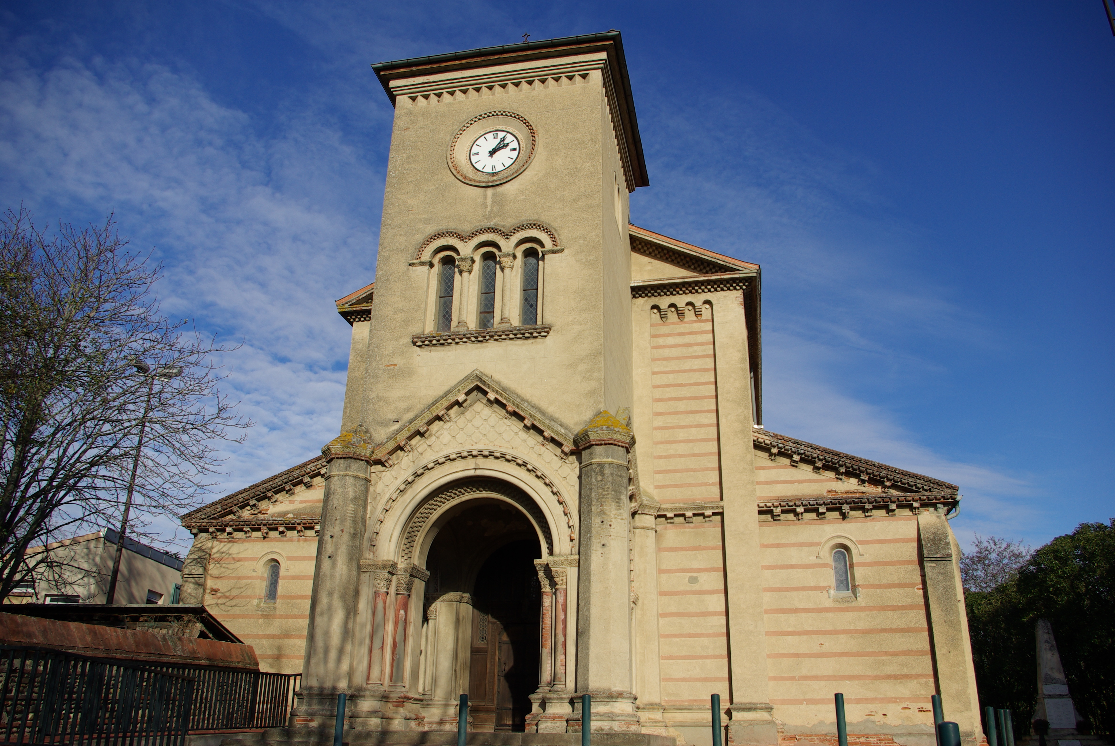 Église Saint-Martin-du-Touch, Toulouse.